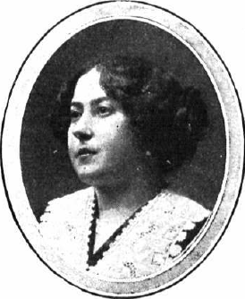 Fotografía de la escritora Concha Espina publicada en Mundo Gráfico en marzo de 1912 con motivo de la publicación de su libro Agua de nieve